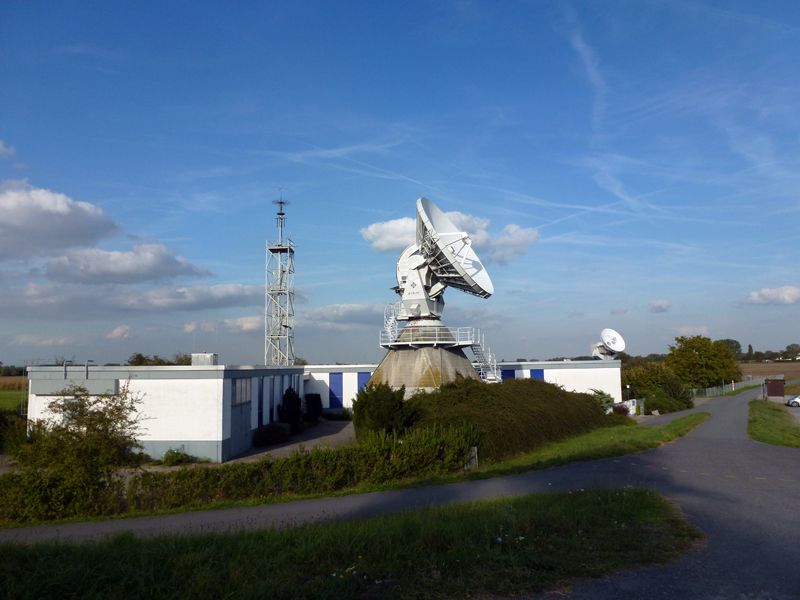 Bundesnetzagentur BNetzA (Außenstelle Eschborn) Satelliten-Messstelle DLZ 16; in Leeheim